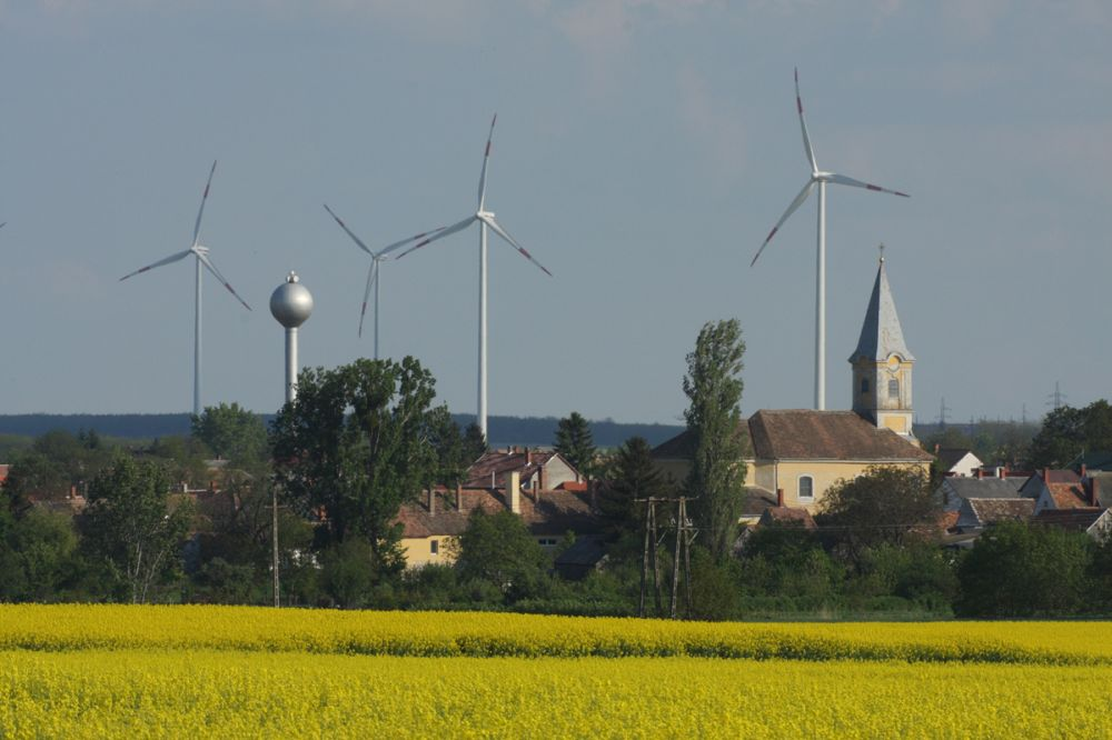 Szélerőműpark Sopronkövesden, az előtérben Pereszteg házai láthatók (Győr-Moson-Sopron megye)